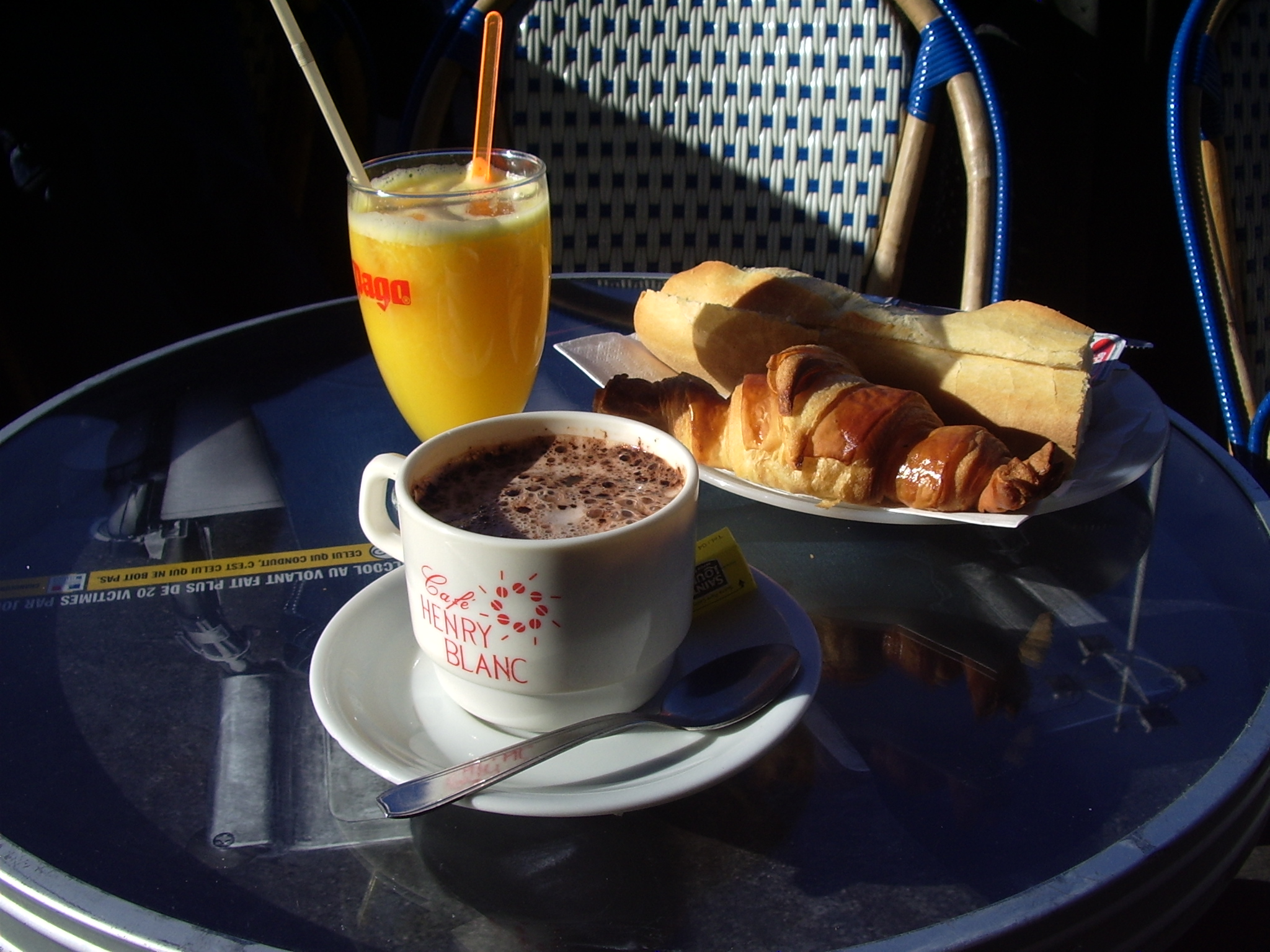 Frühstück in Marseille